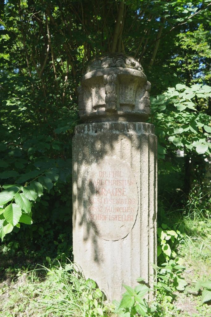 Grab des Schriftstellers und Philosophen Karl Christian Krause (1781-1832) auf dem Alten Südlichen Friedhof in München